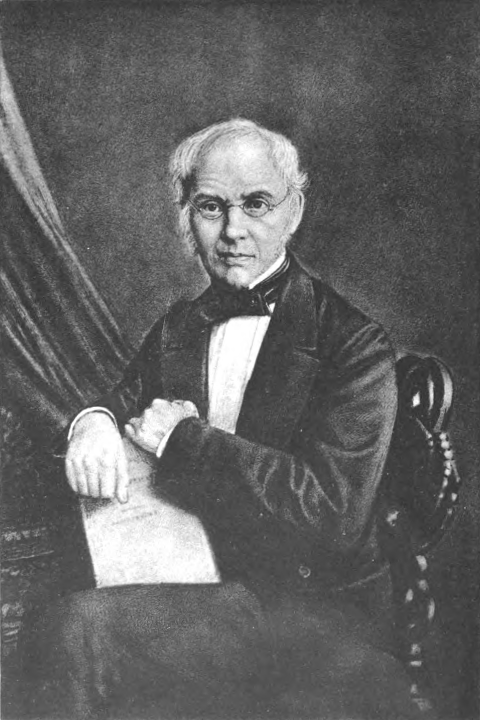 Friedrich Georg von Bunge (1802-1897), baltischer Rechtshistoriker